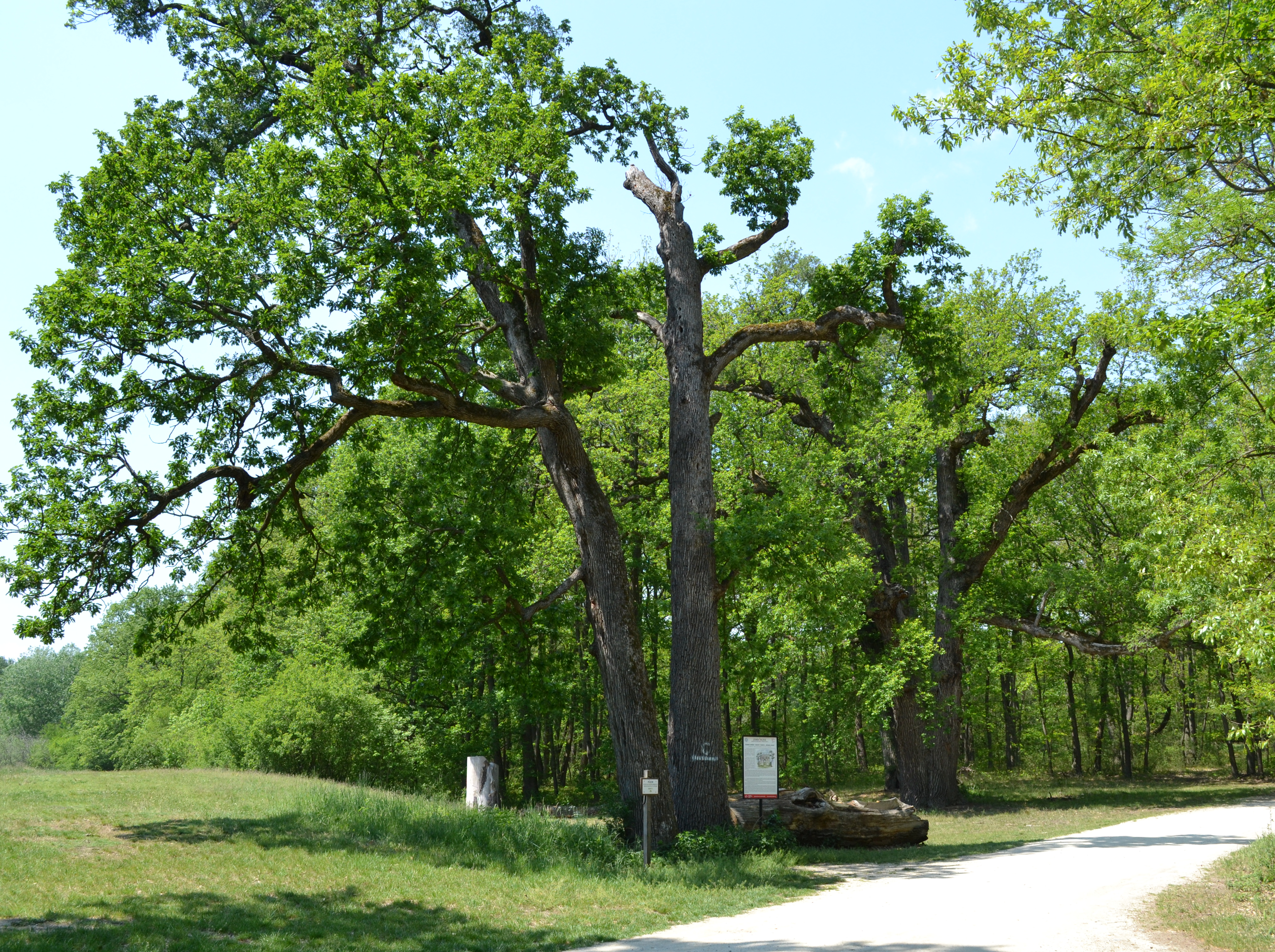 Valtice - PP Rendez-Vous.